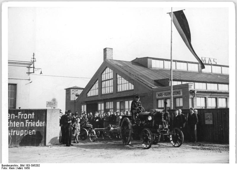 Aufn. Illus-Klein, 31.3.50, MAS Doebeln-Zschackwitz im Einsatz zur erfolgreichen Durchführung der Frühjahrsbestellung. Die Maschinen-Ausleih-Station Doebeln-Zschackwitz im Land Sachsen gehört zu den vorbildlichsten in der Deutschen Demokratischen Republik. Mit allen zur Verfügung stehenden Kräften traf sie die Vorbereitung zur erfolgreichen Durchführung der Frühjahrsbestellung 1950. Jetzt stehen die Traktoren, die fast alle aus der Sowjetunion stammen, Tag und Nacht im Einsatz und helfen der werktätigen Landbevölkerung bei der Frühjahrsbestellung und bei der Verwirklichung des großen Zieles: Erreichung der Friedenshektarerträge im Jahr 1950. UBz.: Die Traktoren verlassen die MAS und fahren zur Frühjahrsbestellung in ihre Bestimmungsorte. 6016-50